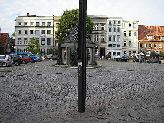 Koberg in Lübeck